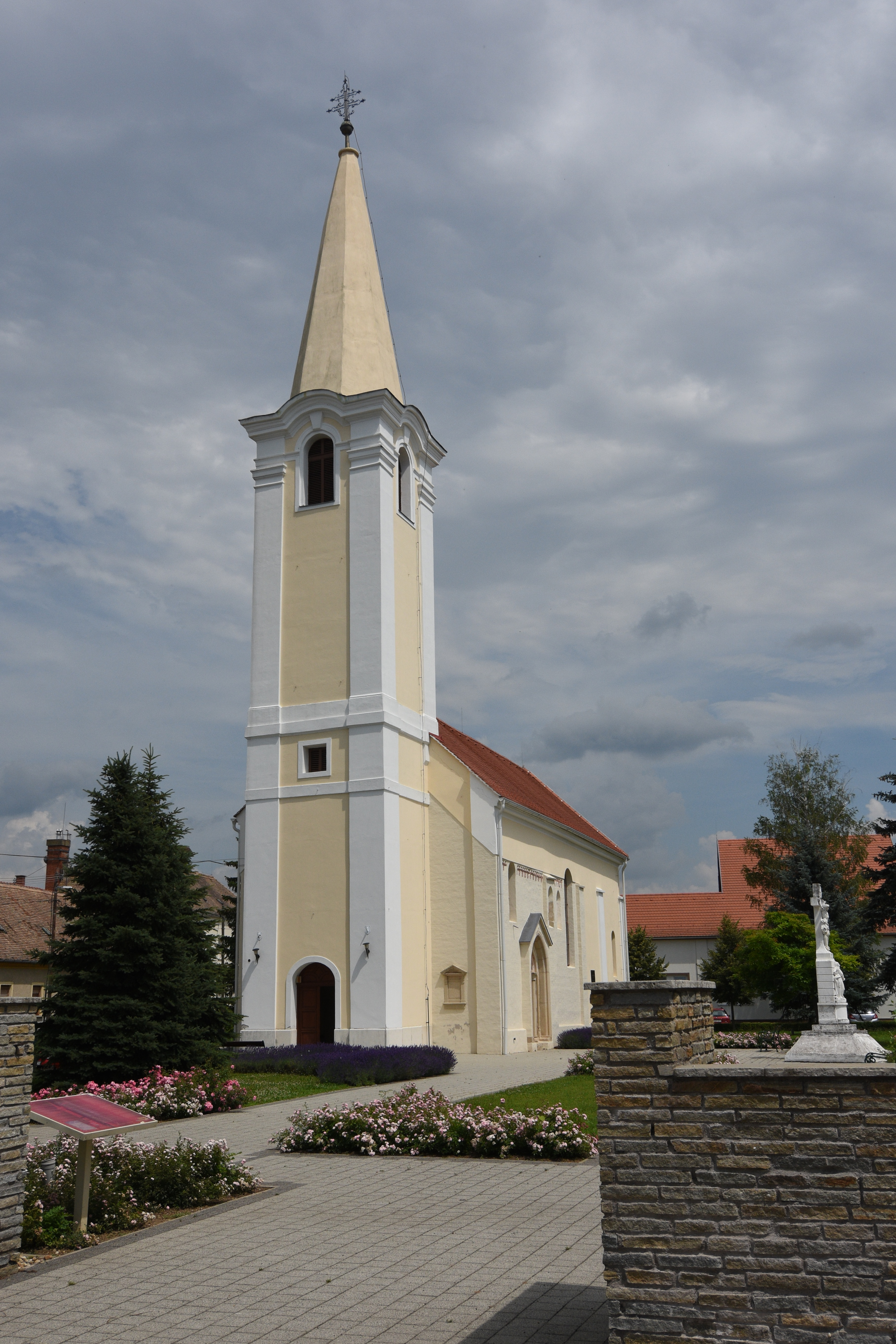 Roman Catholic Church in Bő